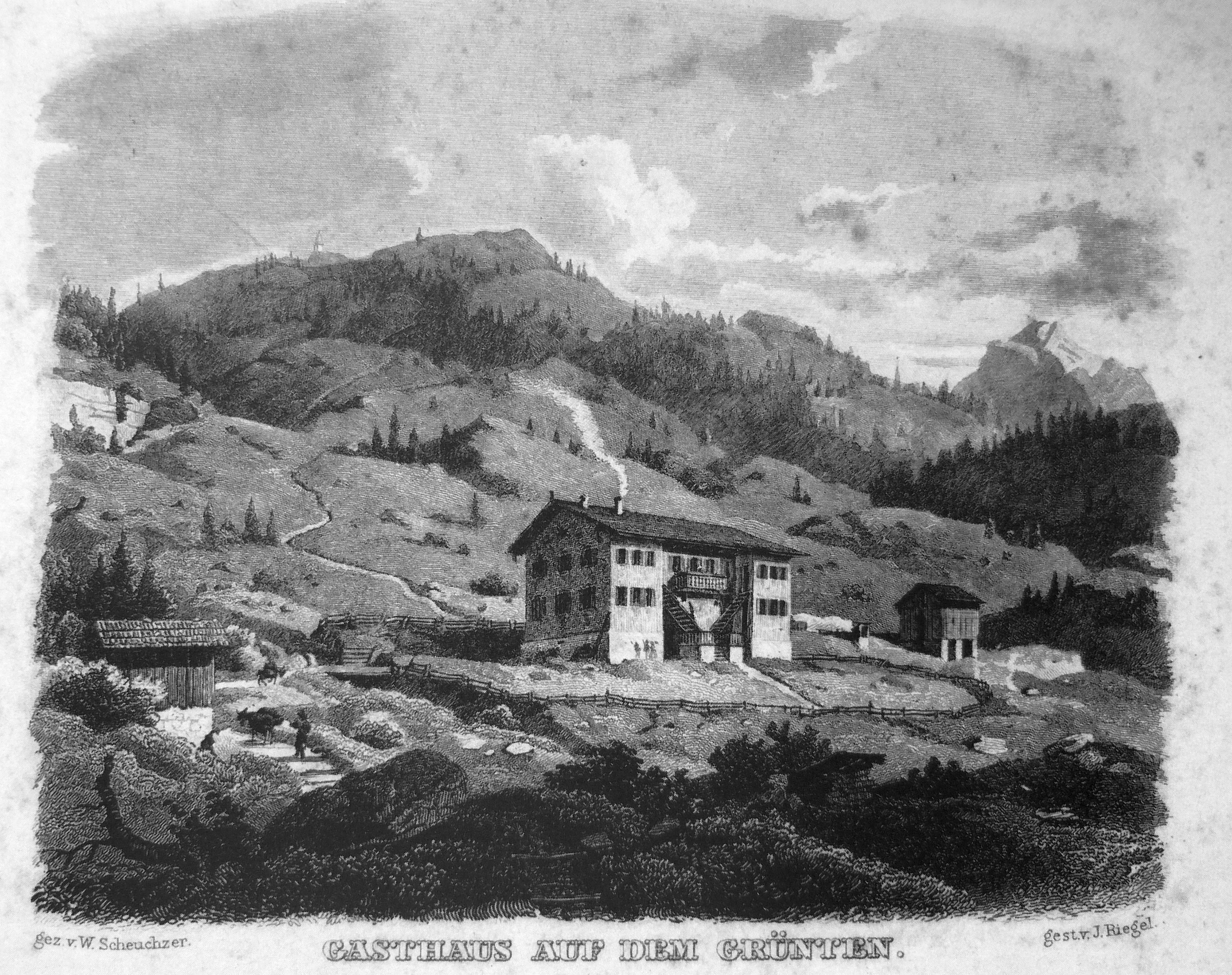 "Gasthaus auf dem Grünten", Stahlstich, gezeichnet von W. Scheuchzer, gestochen durch J. Riegel.